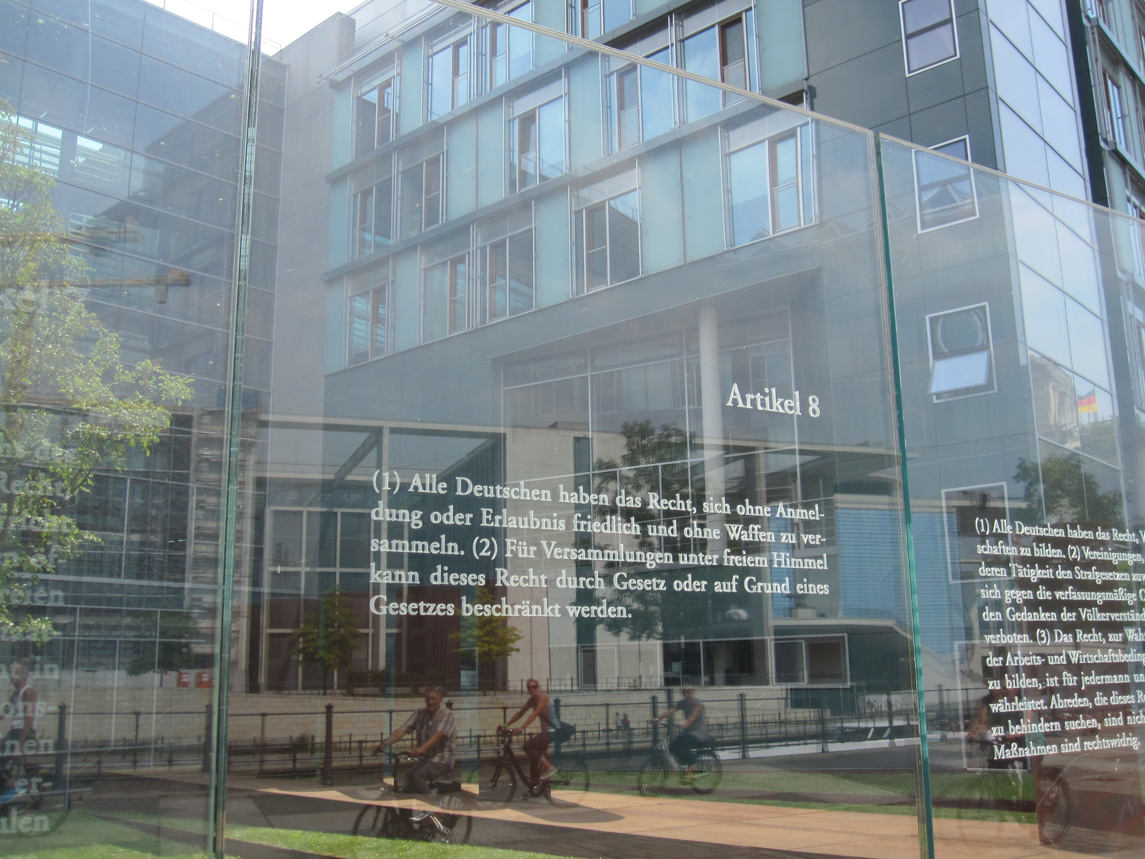 Bundestagsgebäude in Berlin: Der israelische Künstler Dani Karavan hat in drei Meter hohe Glasscheiben, die einen Außenhof des Jakob-Kaiser-Hauses im Uferbereich zur Spree begrenzen, die 19 Grundrechtsartikel des Grundgesetzes mit Laser eingraviert. „Die Grundrechtsartikel schweben gleichsam in Augenhöhe vor dem Haus der Fraktionen, dem Jakob-Kaiser-Haus“ (Andreas Kaernbach, Deutscher Bundestag).